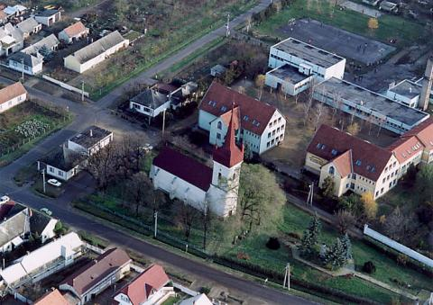 Vaja, Hungary, aerialphotgraphy